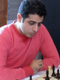 Ehsan Ghaem Maghami, 2013 in Ragaz / Schweiz